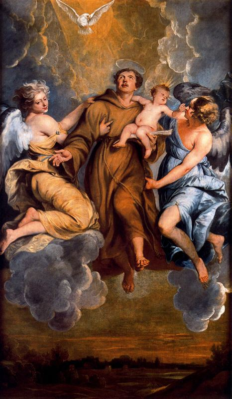 Asunción de san Antonio de Padua